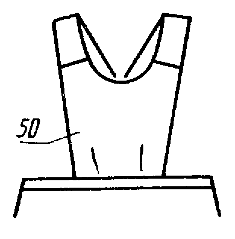 Изображение из ГОСТ 22977-89 (СТ СЭВ 6484-88) — Детали швейных изделий. Термины и определения.